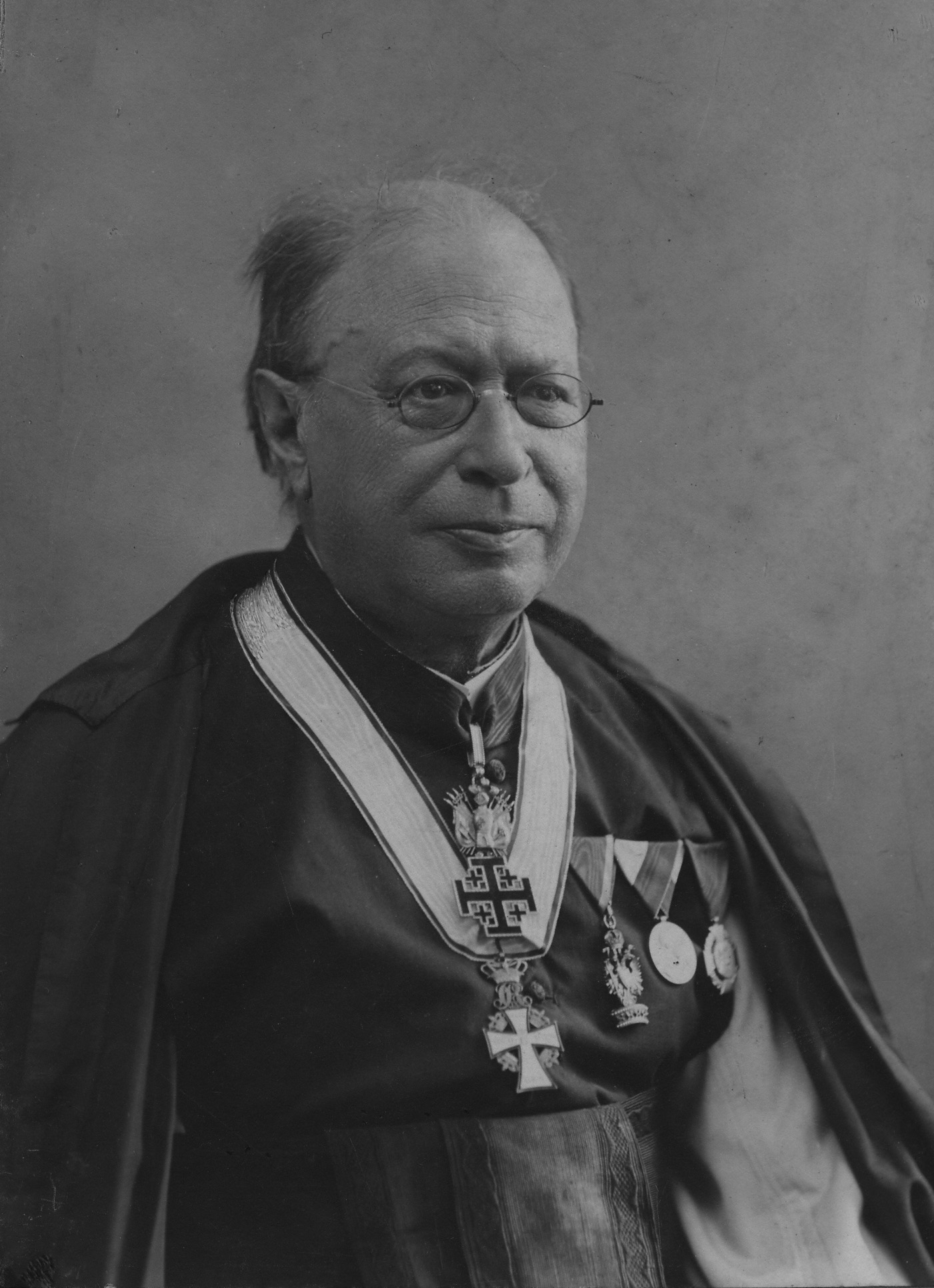 Wilhelm Anton Neumann, Zisterzienser von Heiligenkreuz, war Archäologe, Bibelwissenschaftler und Mediävist. 1899-1901 war er Rector Magnificus der Universität Wien.